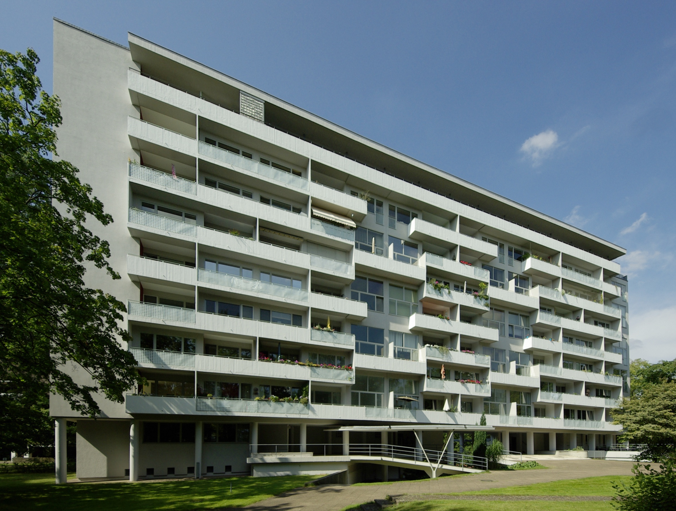 Klopstockstraße 14-18 in Berlin-Hansaviertel. Wohnhaus (1956 bis 1957) von Pierre Vago